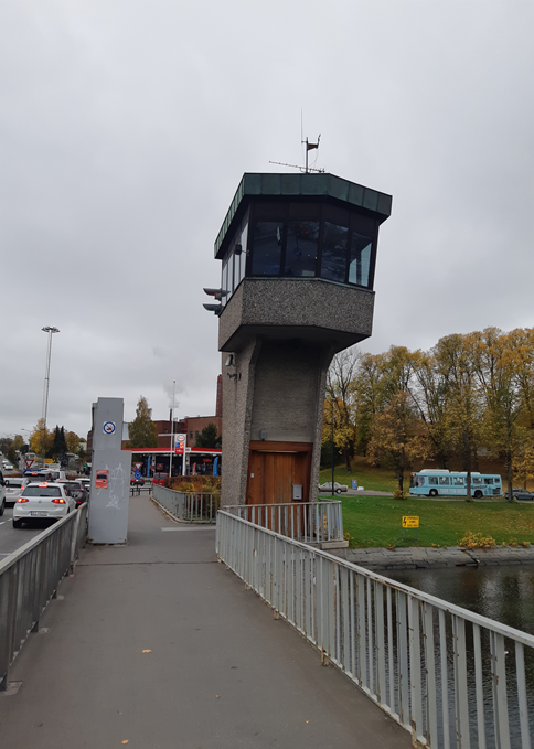 Kontrolltårnet på Tønsberg kanalbru. Bildet er tatt i oktober 2018.